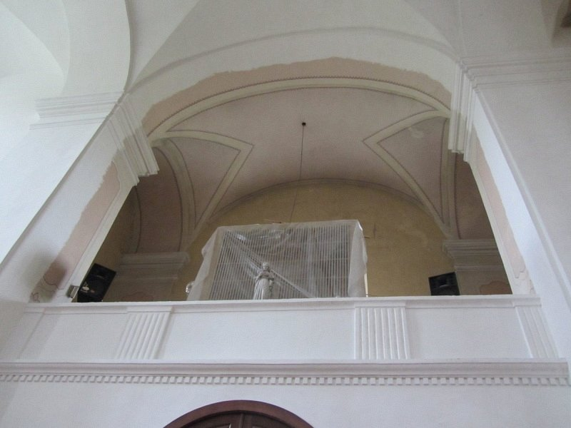 Астравец. Касцёл Святых Касмы і Даміяна